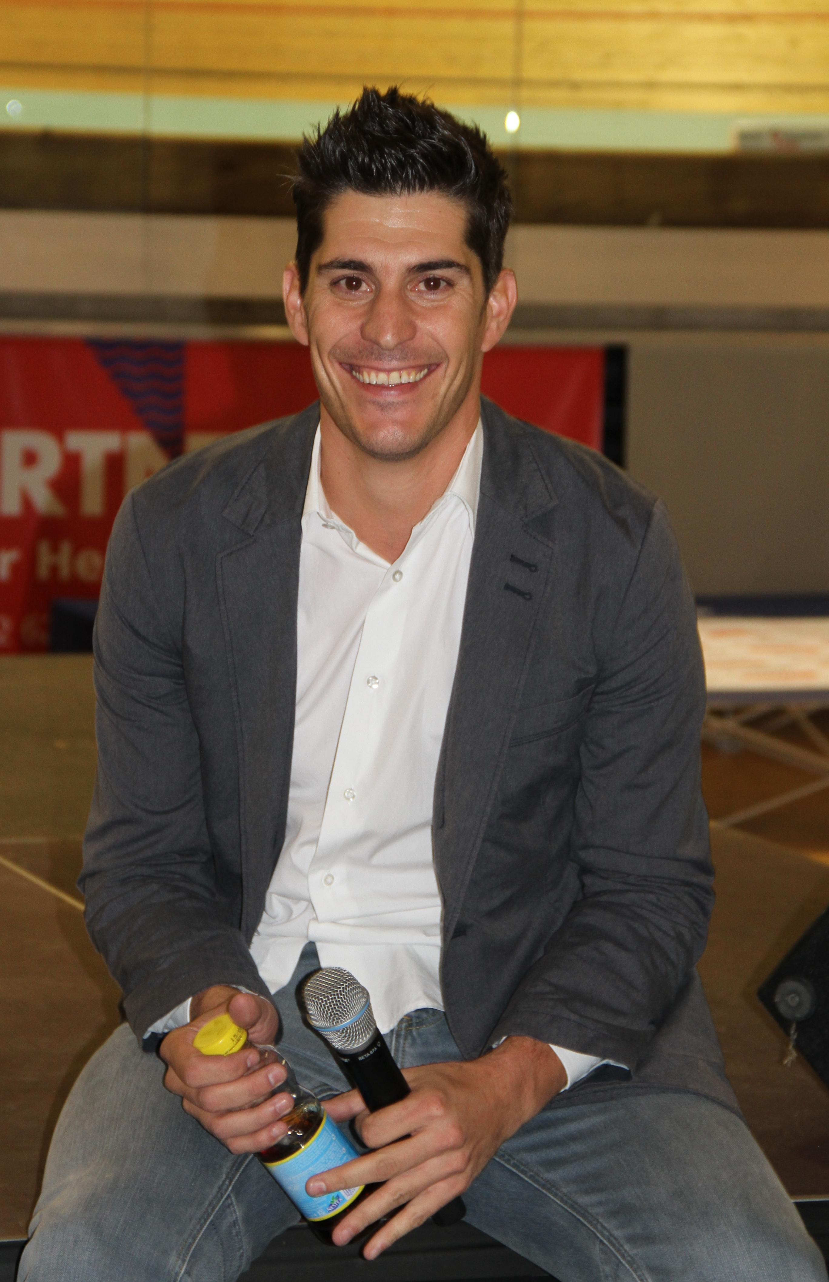 Franco Marvulli, ehem. Schweizer Radsportler, Moderator der EM The making of this document was supported by the Community-Budget of Wikimedia Germany.